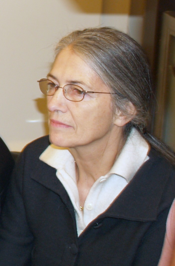 Michèle Manoa lors d'une rencontre avant les élections régionales françaises de 2010 à Montpellier dans la région Languedoc-Roussilon.